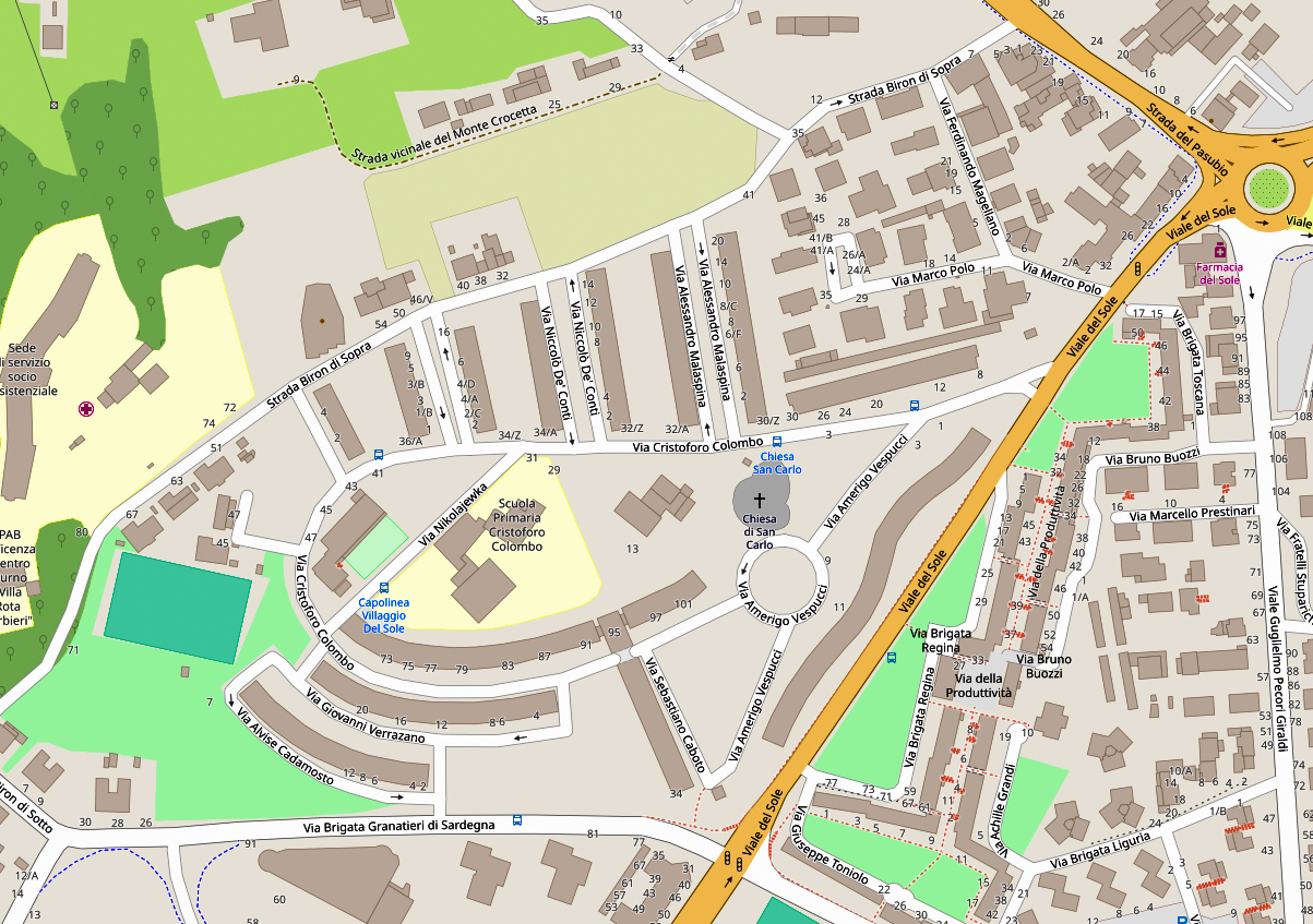 Villaggio del Sole e della Produttività